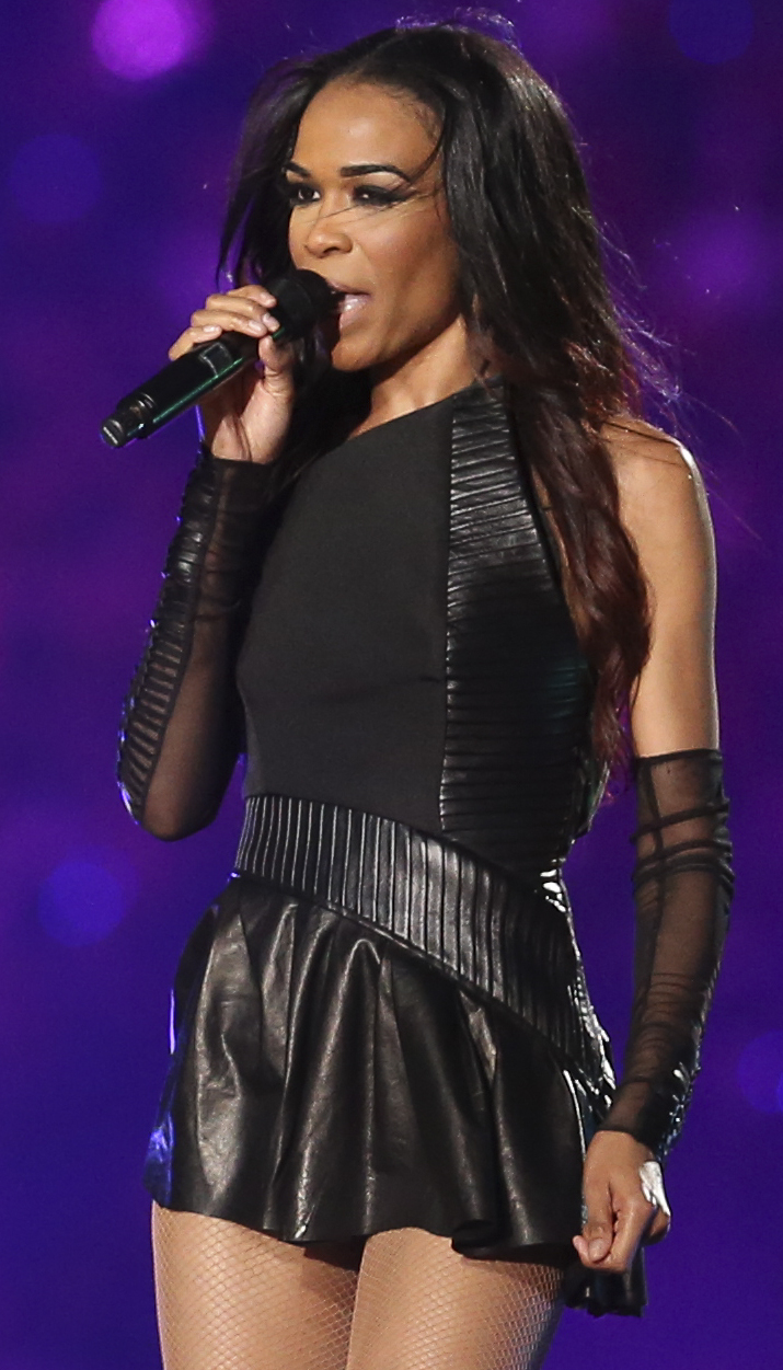 DW2Q0666